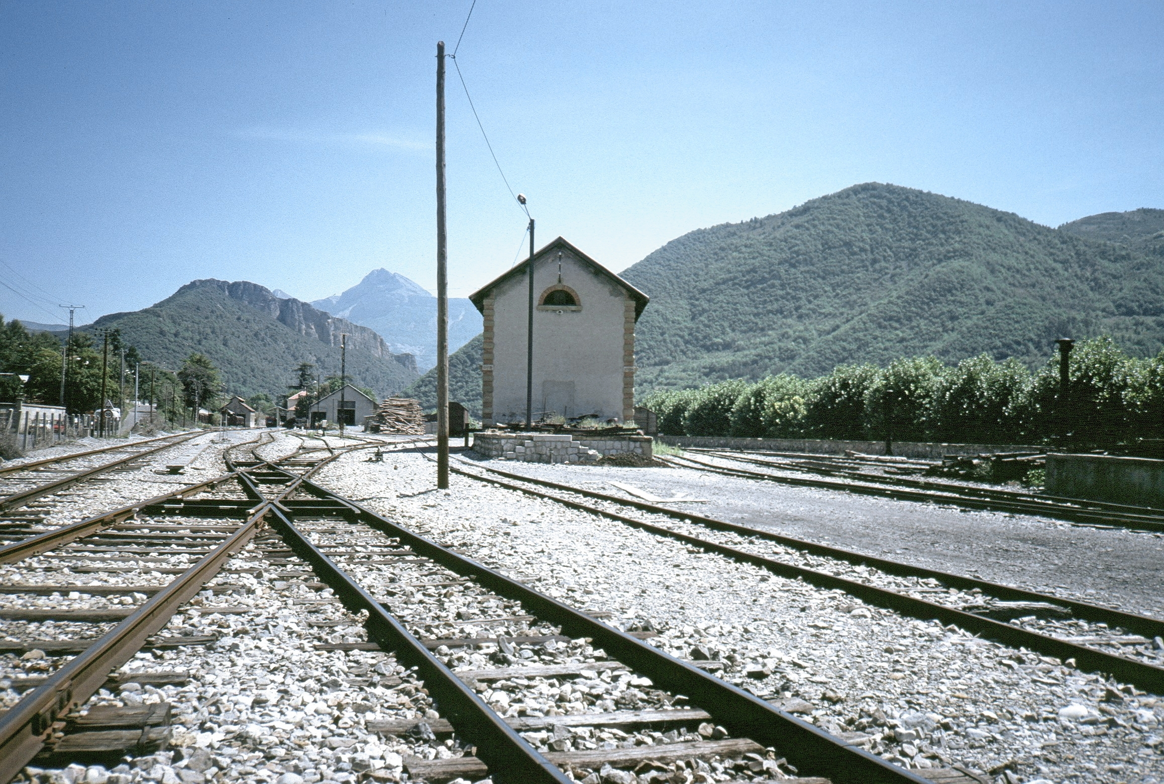 Bahnhof Digne von Westen